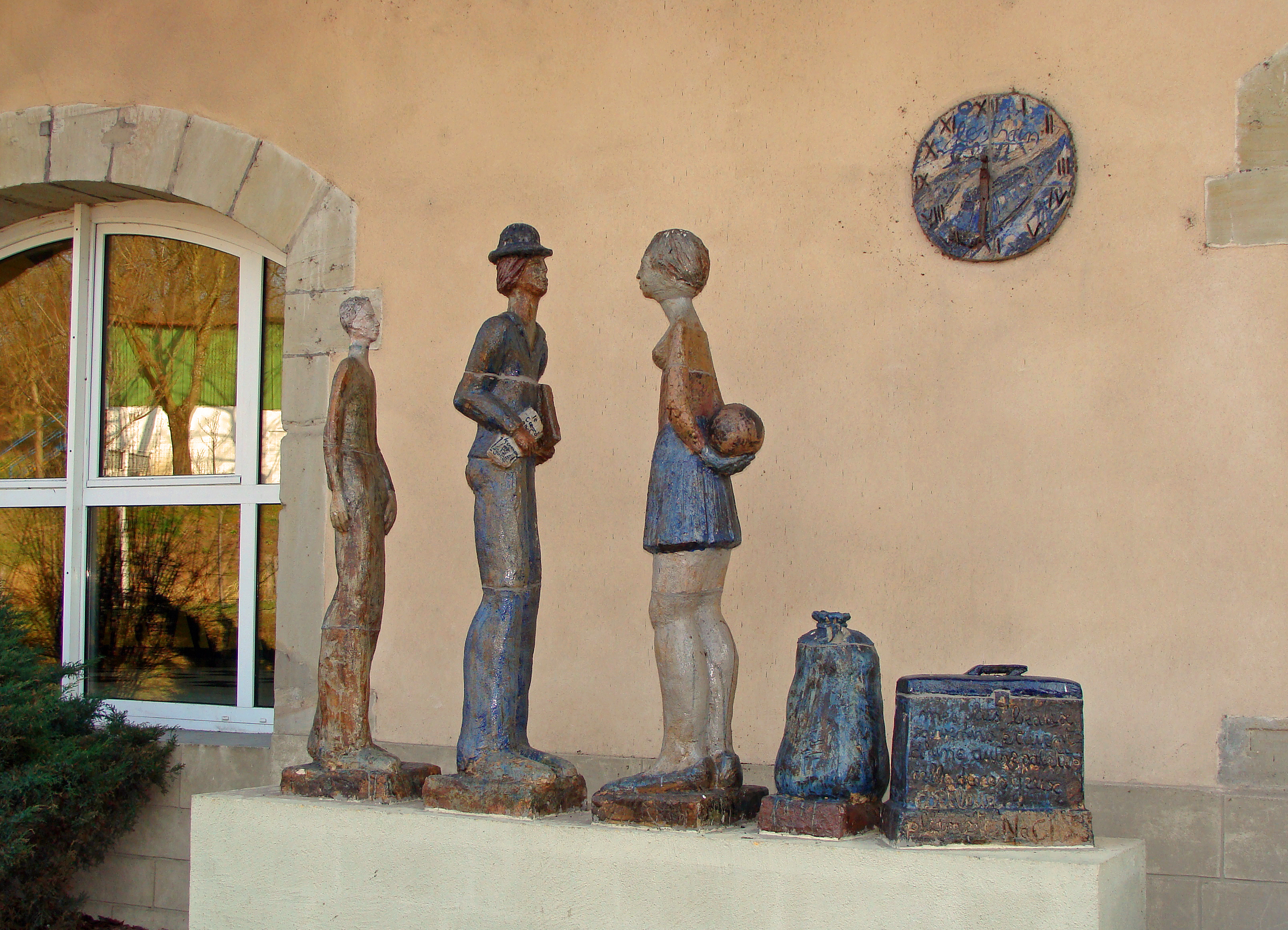 Sculpture en gare de L'Hôpital (Moselle)